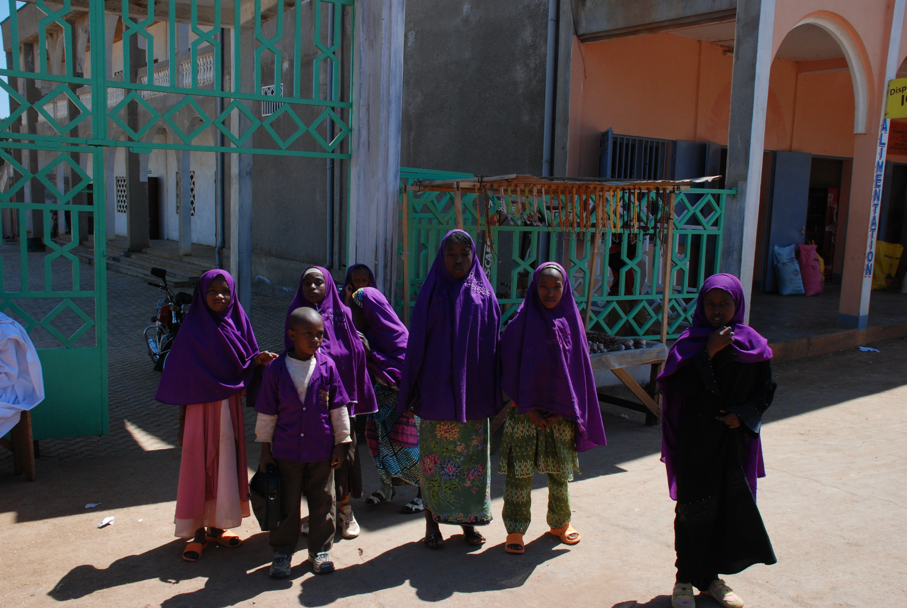 Les élèves d'une école coranique au Tchad This is an image of Cultural Fashion or Adornment from Cameroon